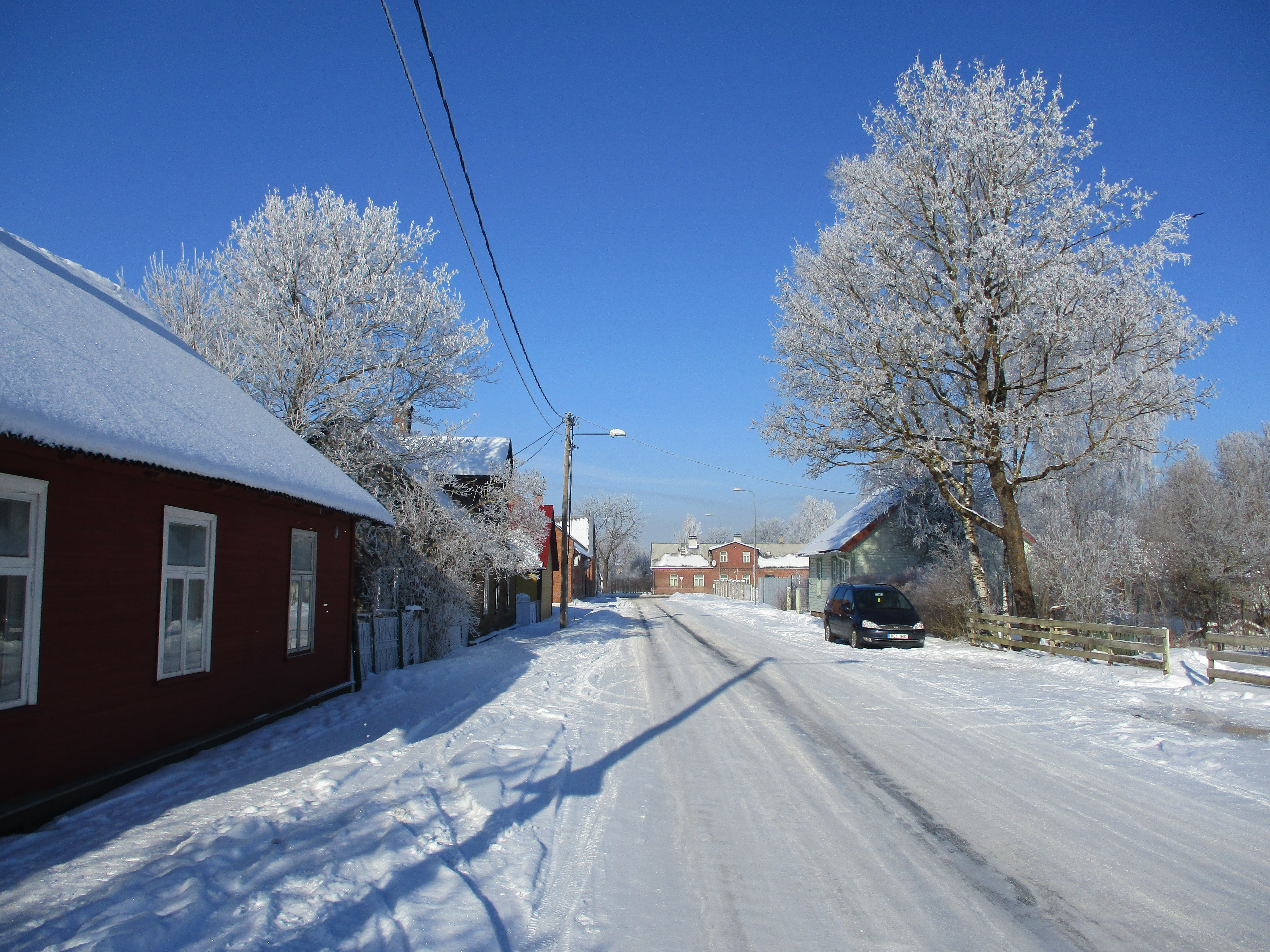 Vaade Tehnika tänavalt põhja poole Vaksali tänava suunas.